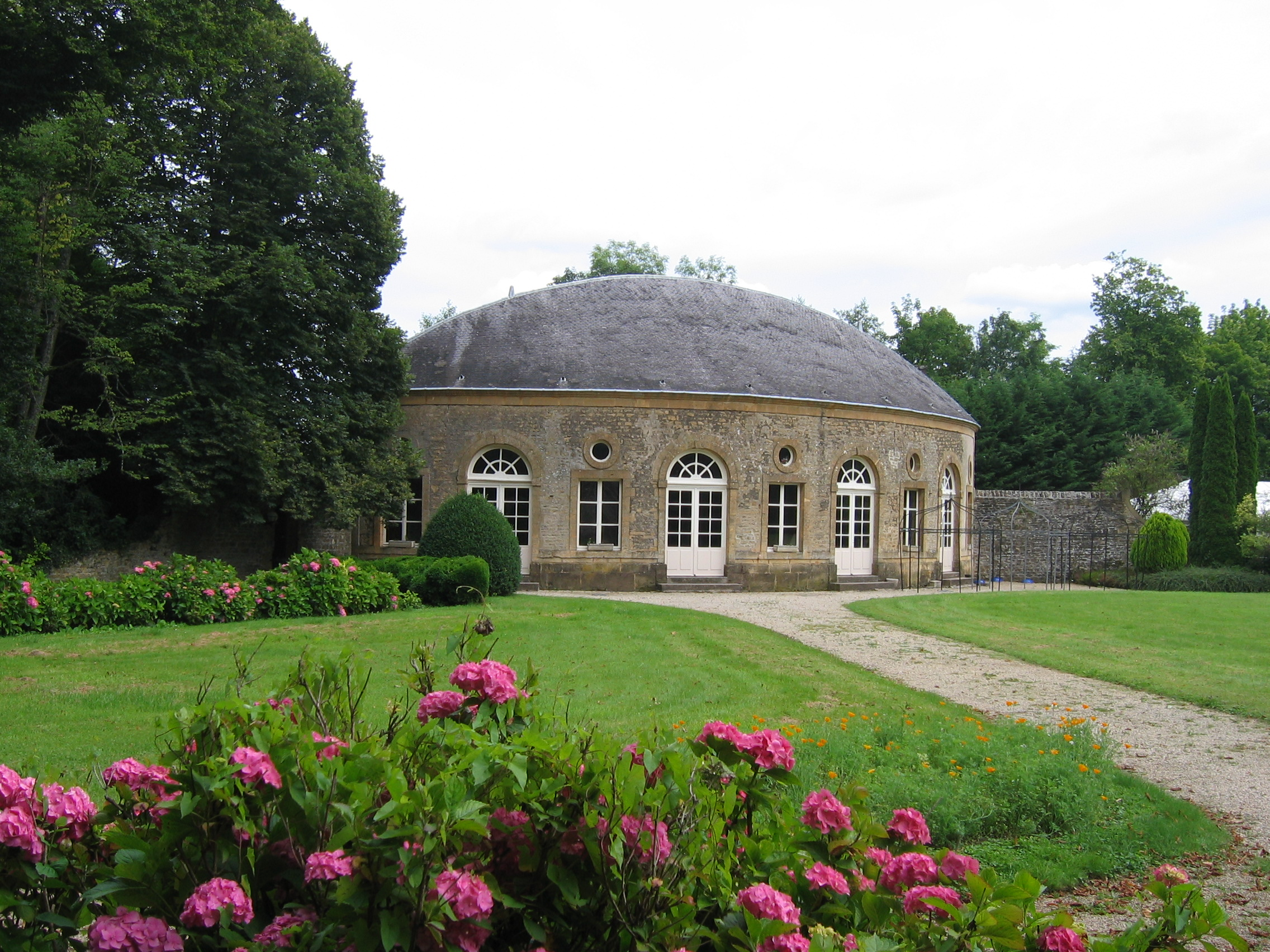 Château de Bazeilles, Bazeilles, Ardennes (France)